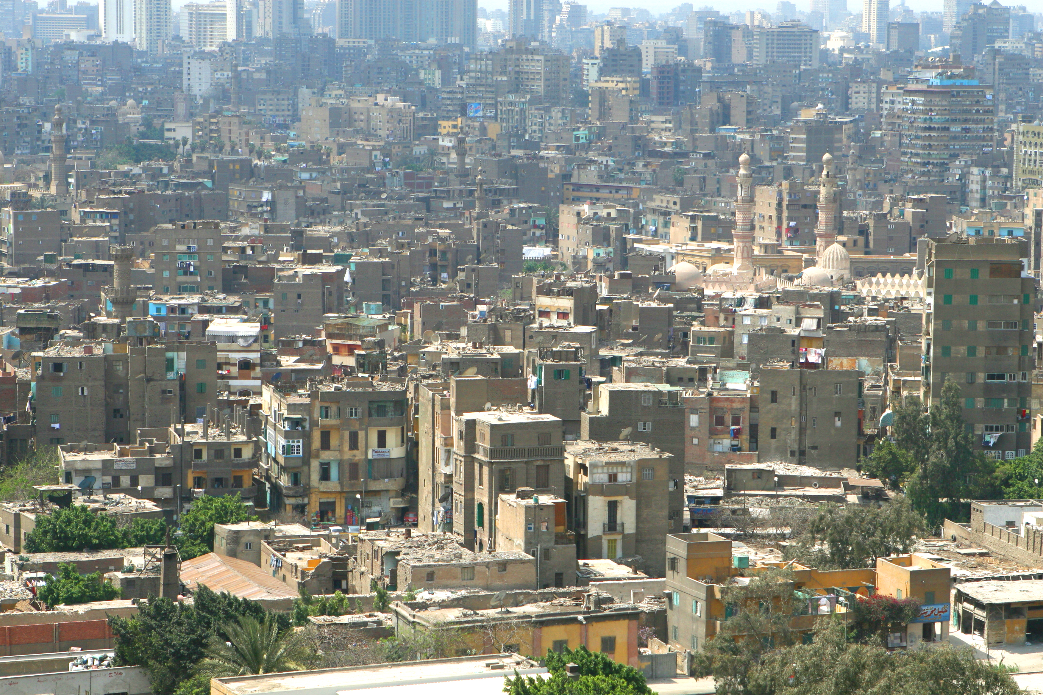 Cairo